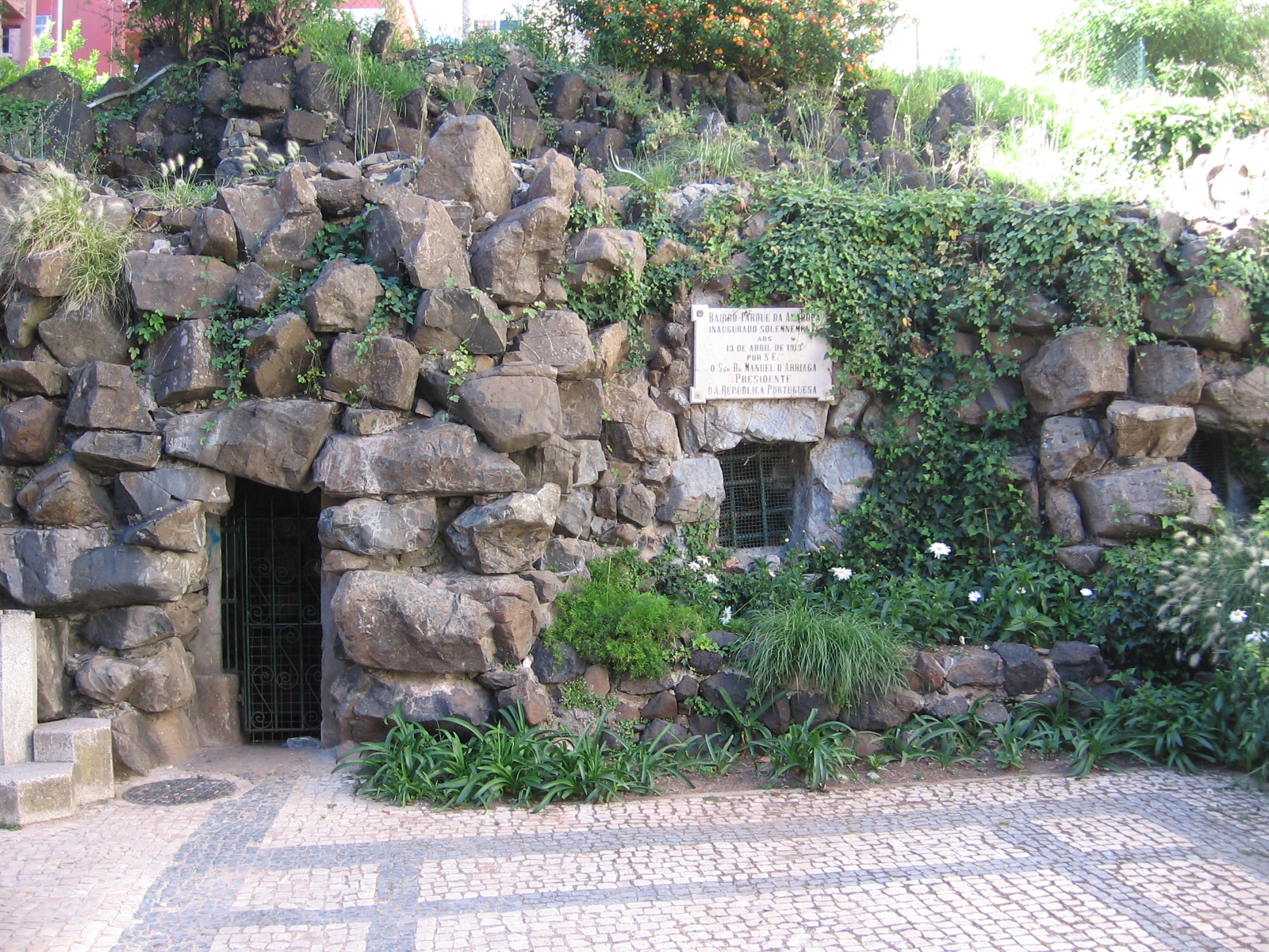 Mina, Amadora, Portugal